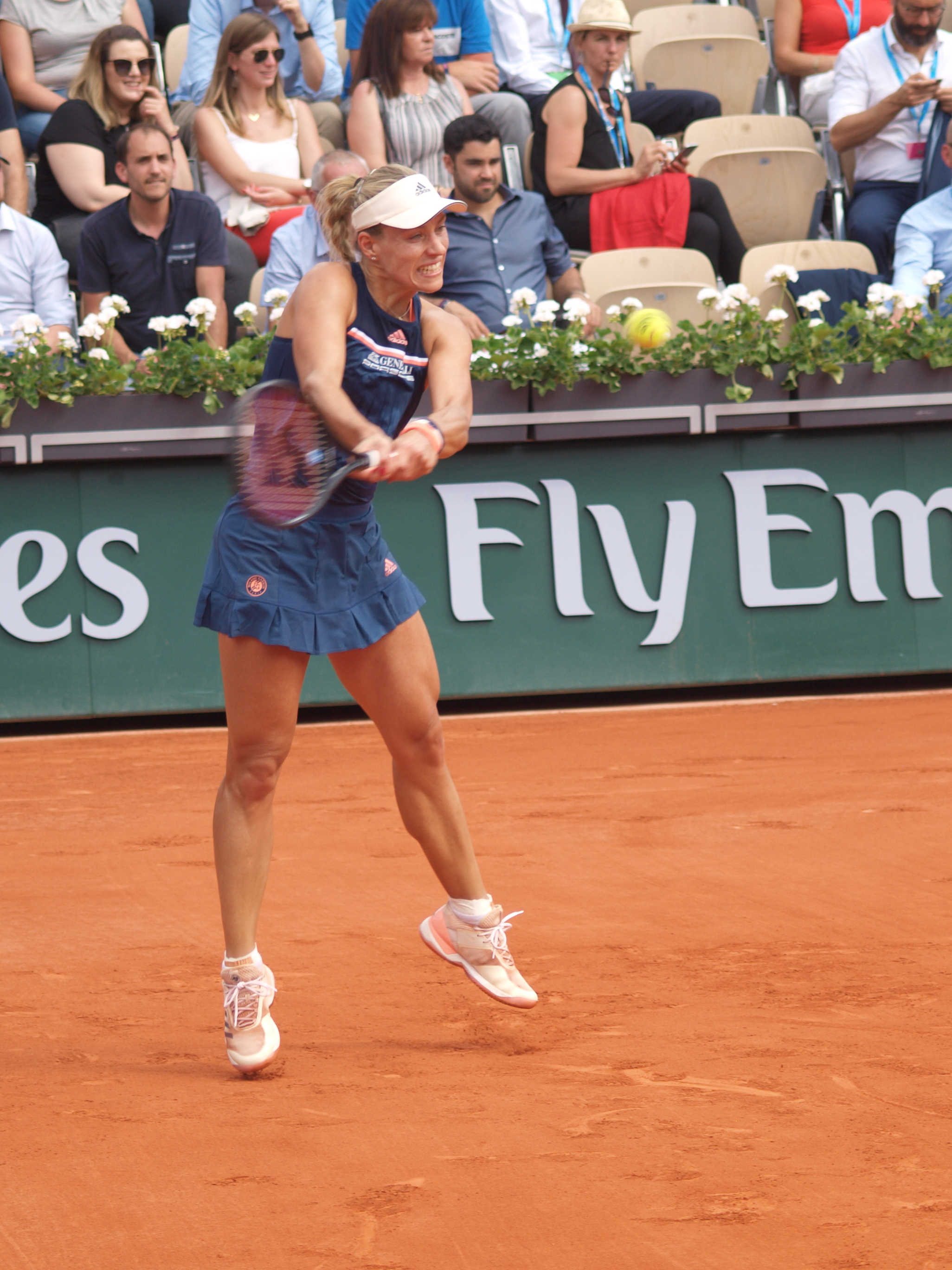 Angelique Kerber lors de son match contre Caroline Garcia, sur le cours Suzanne Lenglen (stade Roland Garros à Paris), le 4 juin 2018